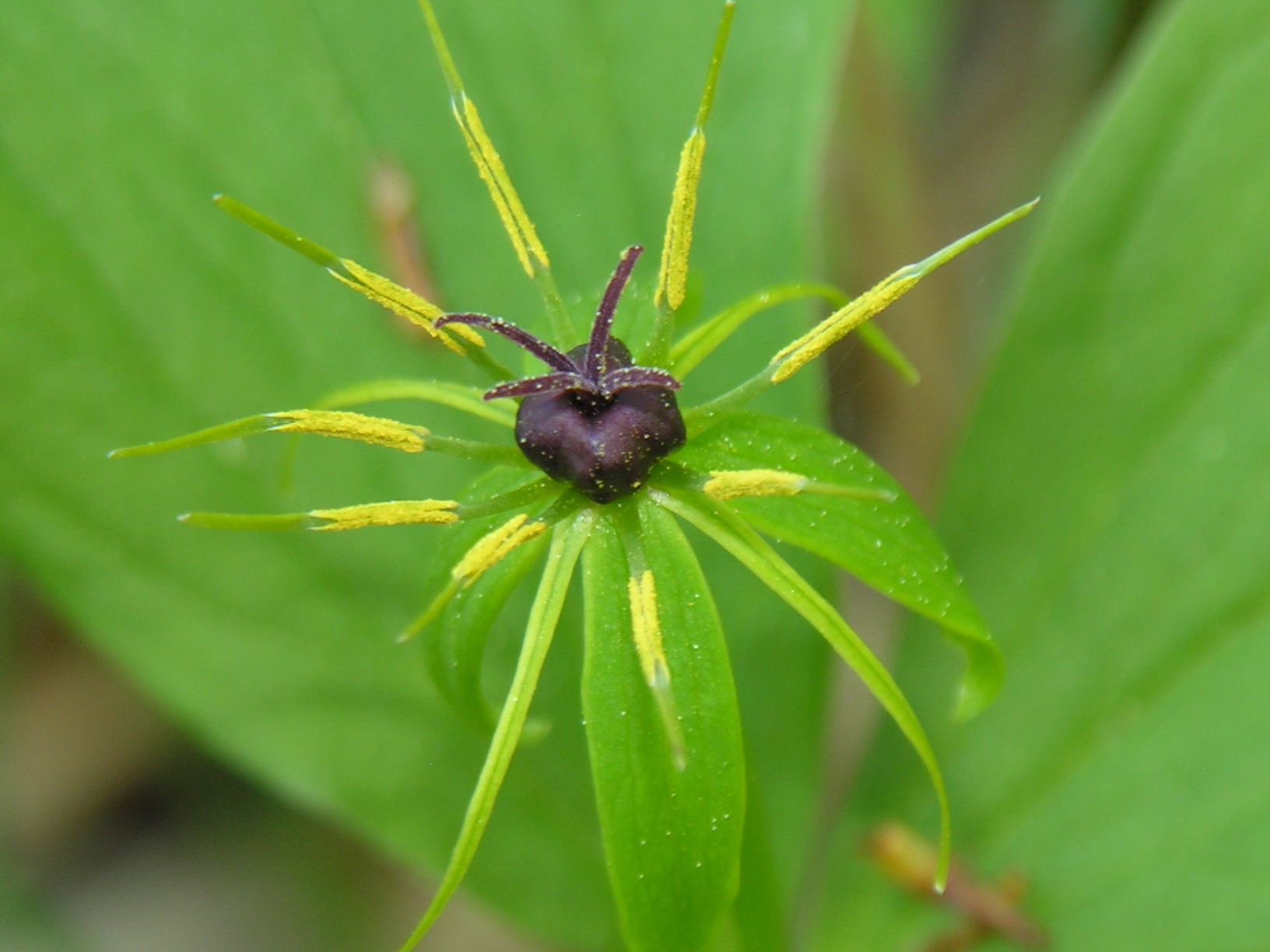 Keturlapės vilkauogės (Paris quadrifolia) žiedas Šeima. Melantiniai (Melanthiaceae) Foto: Algirdas, 2006 m. gegužės 13 d., Lietuva